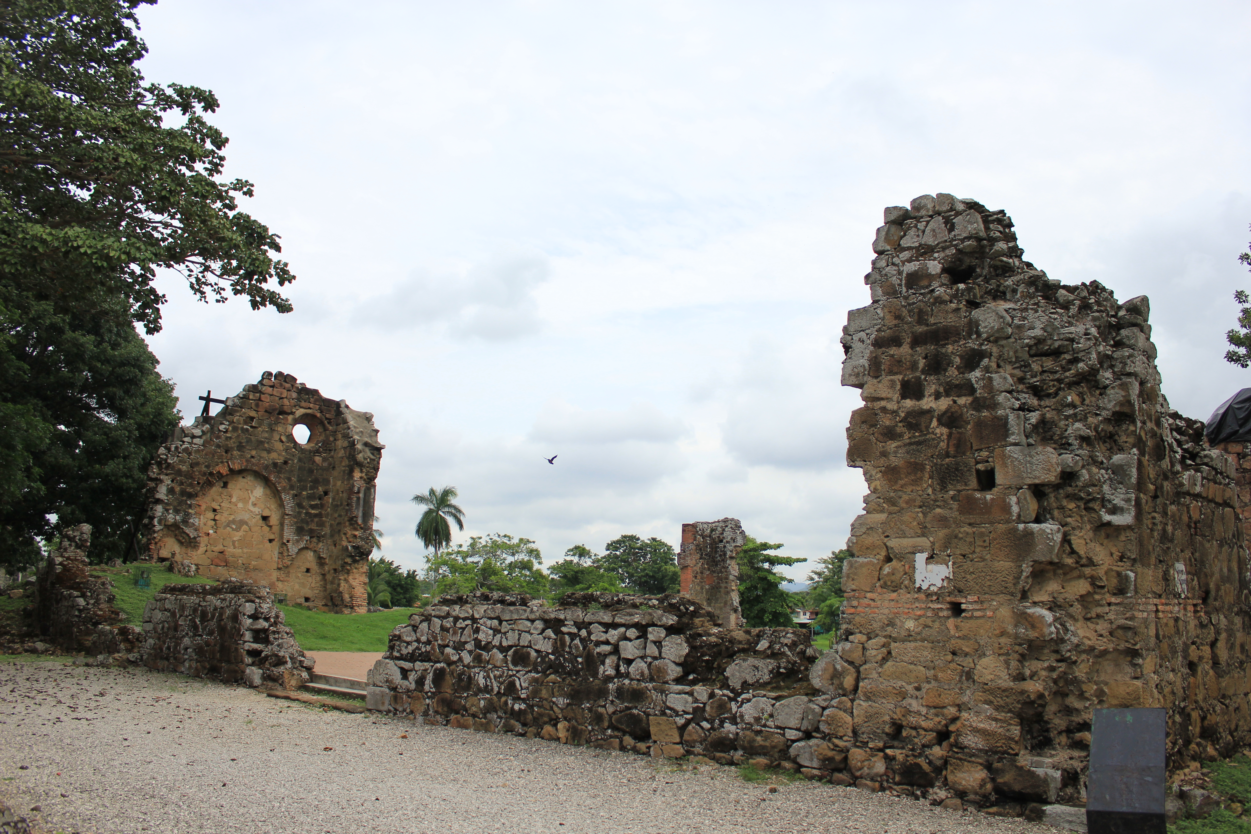 Conjunto Monumental Histórico de Panamá Viejo, Panamá. Declarado Patrimonio de la Humanidad por UNESCO.